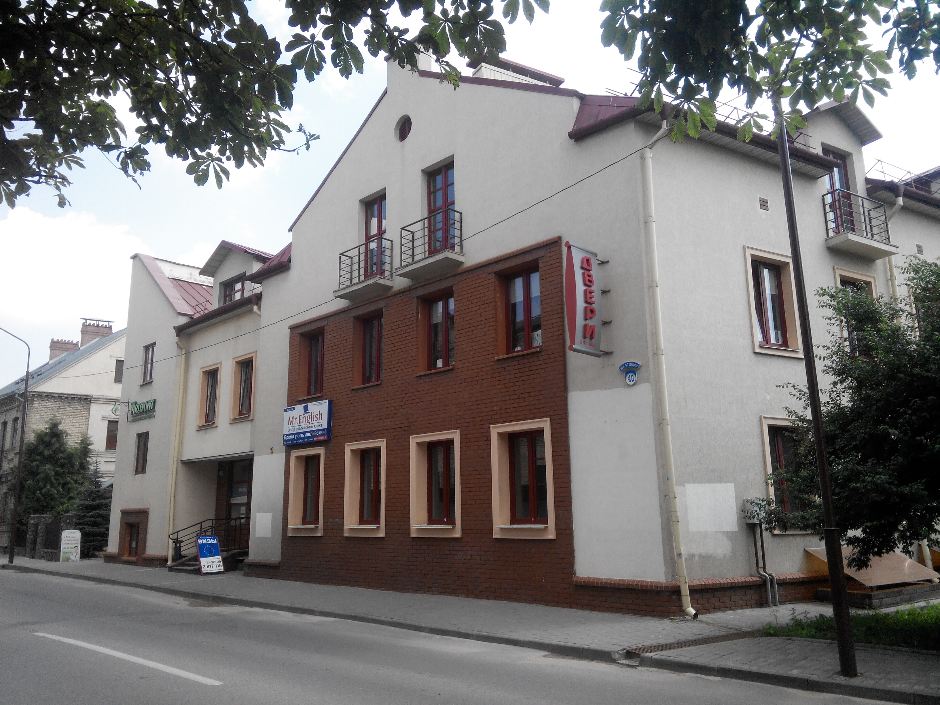 Будынак па вуліцы Вялікая Траецкая, 48, Гродна, Беларусь